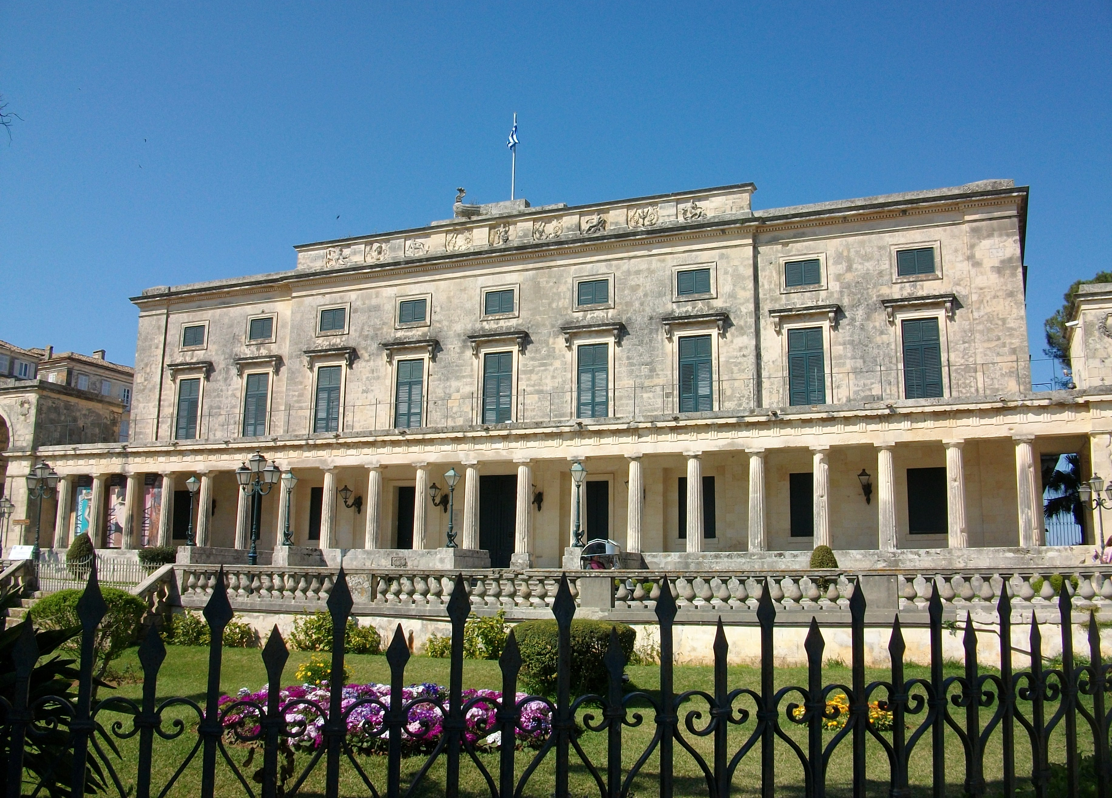 Palau de sant Miquel i sant Jordi - Palaia Anaktora, Corfú.